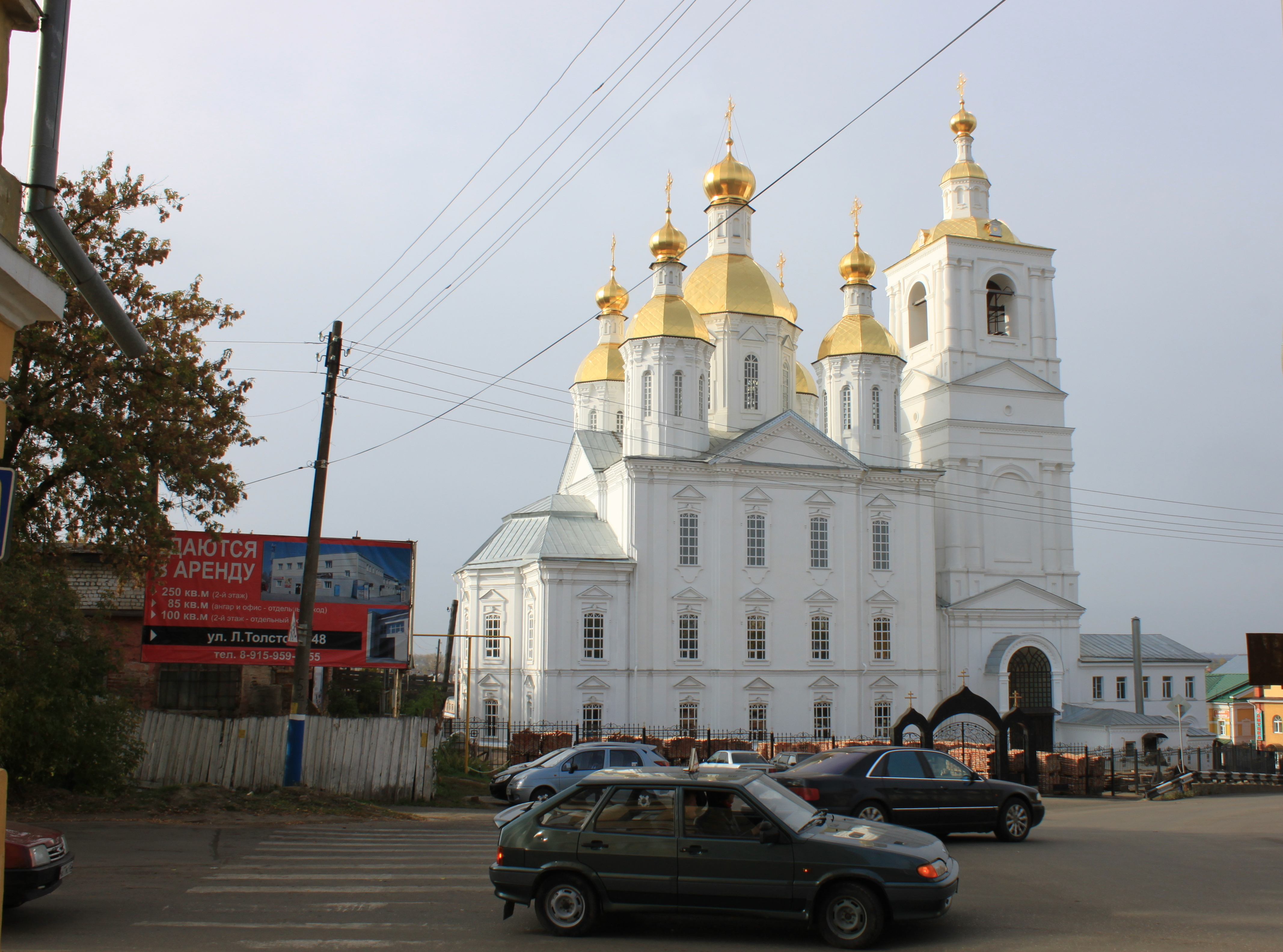 Благовещенская церковь в Арзамасе